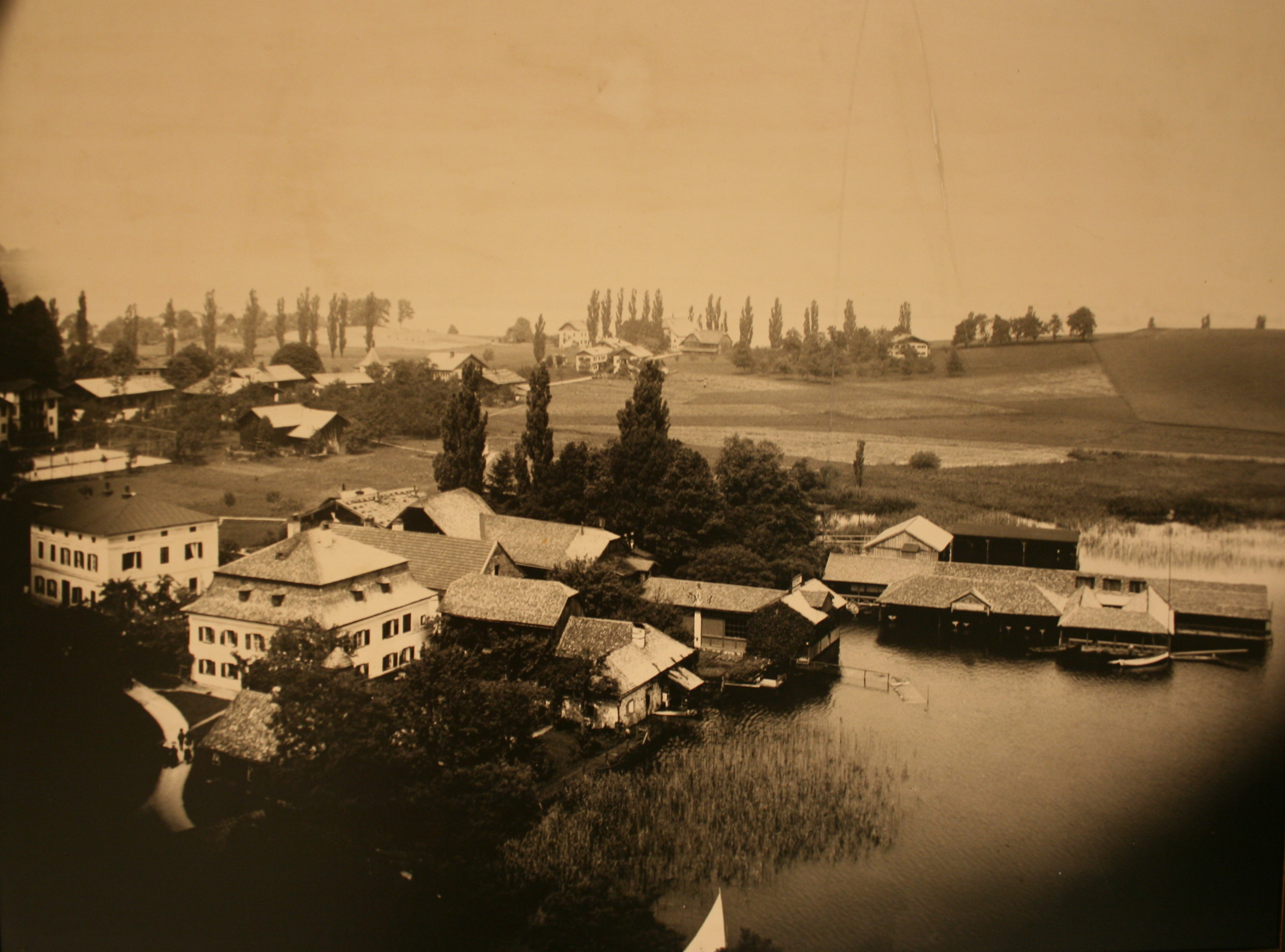 Alter Fotodruck mit Blick auf Mattsee mit Seewirt und Doktor-Häuschen.